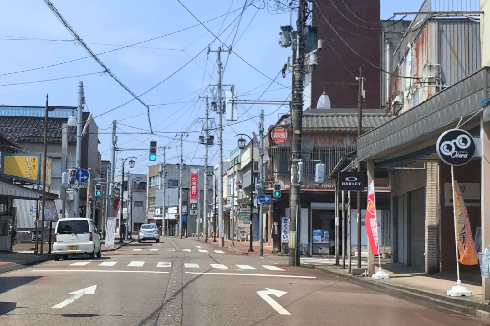 燕市のサンロード宮町商店街（2020年4月）3・8のつく日には定期市が開かれる（撮影は非開催日）。2013年までは全蓋式アーケードが架かっていた。